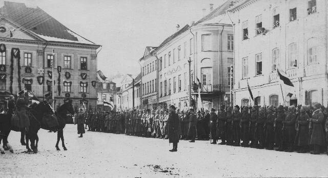 Muuseumikogu Fotokogu Olemus foto Säilivus rahuldav